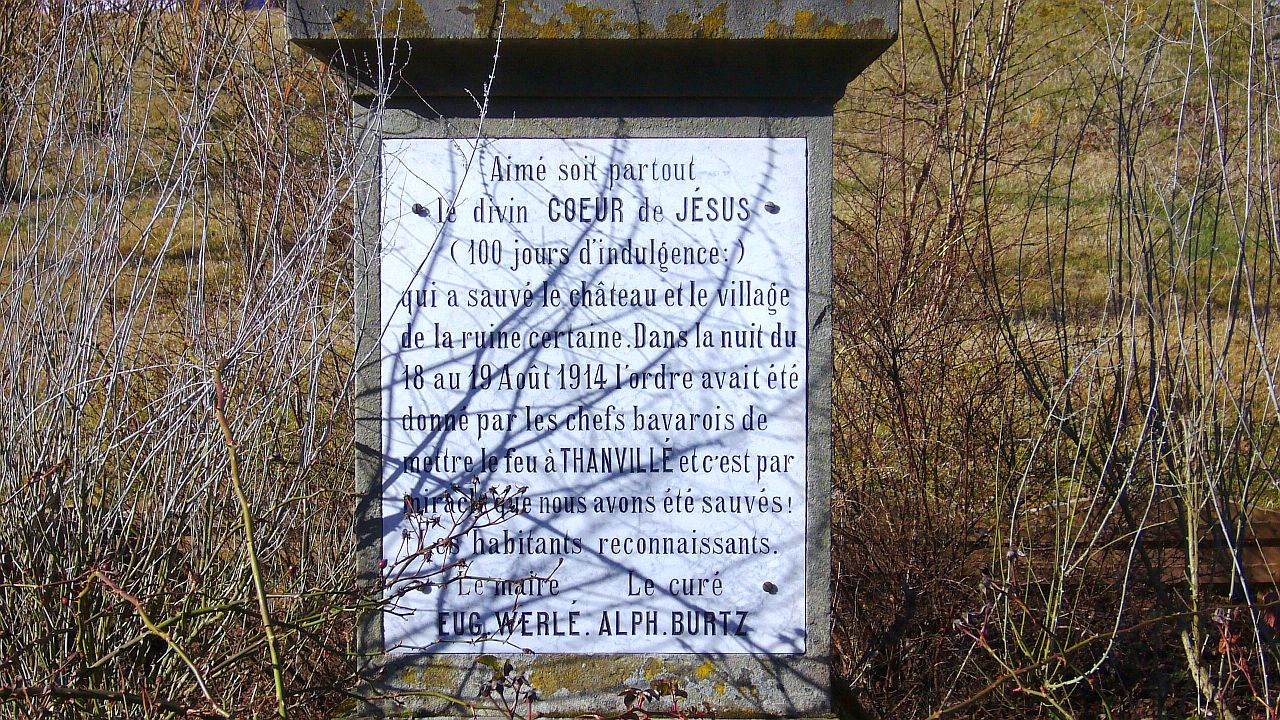 Epithaphe se trouvant au bas de la statue du Sacré Coeur de Thanvillé